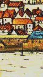 Heilbronn, Katharinenspital mit Johanneskirche, Ausschnitt